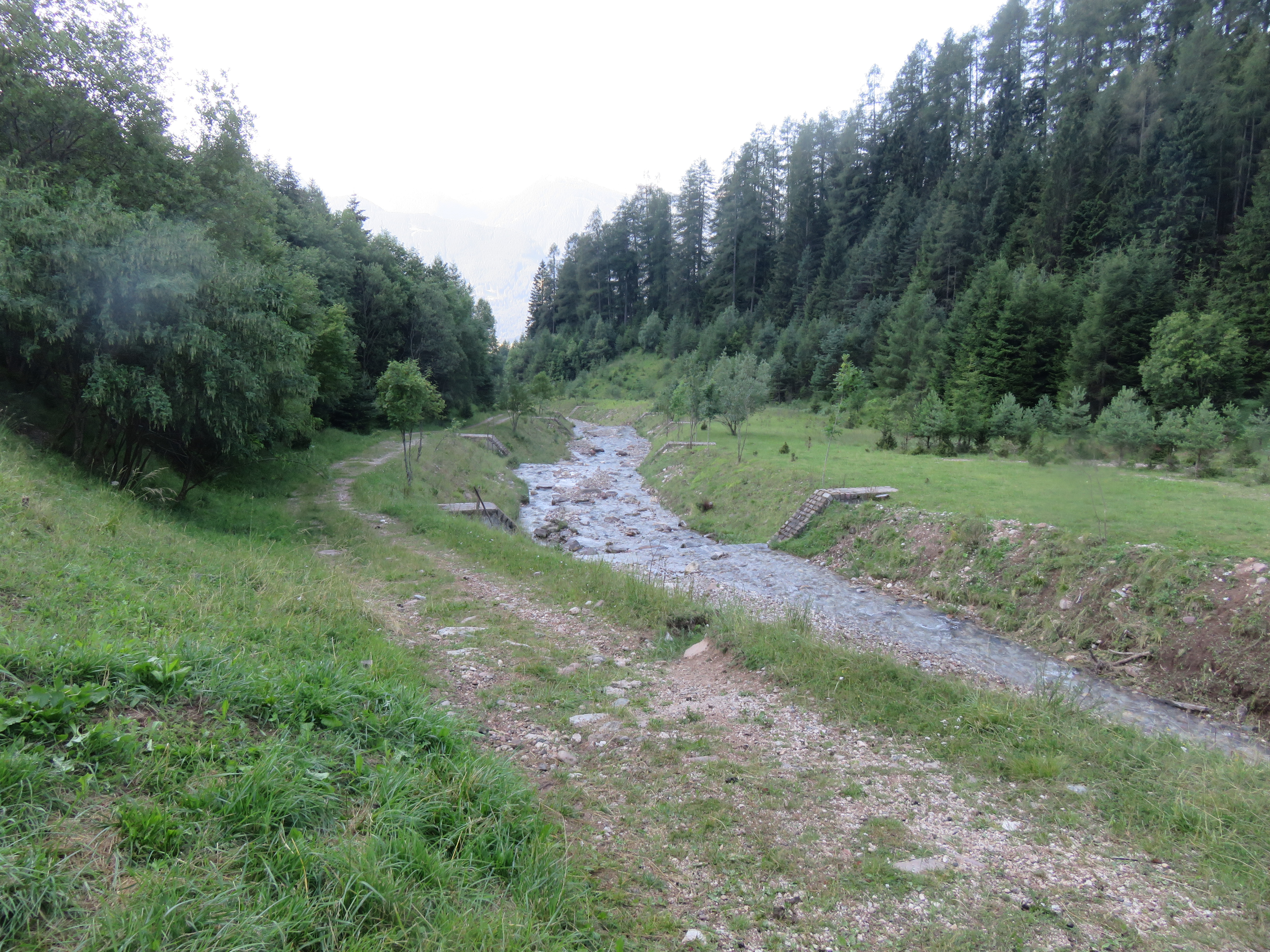 Rio Stava